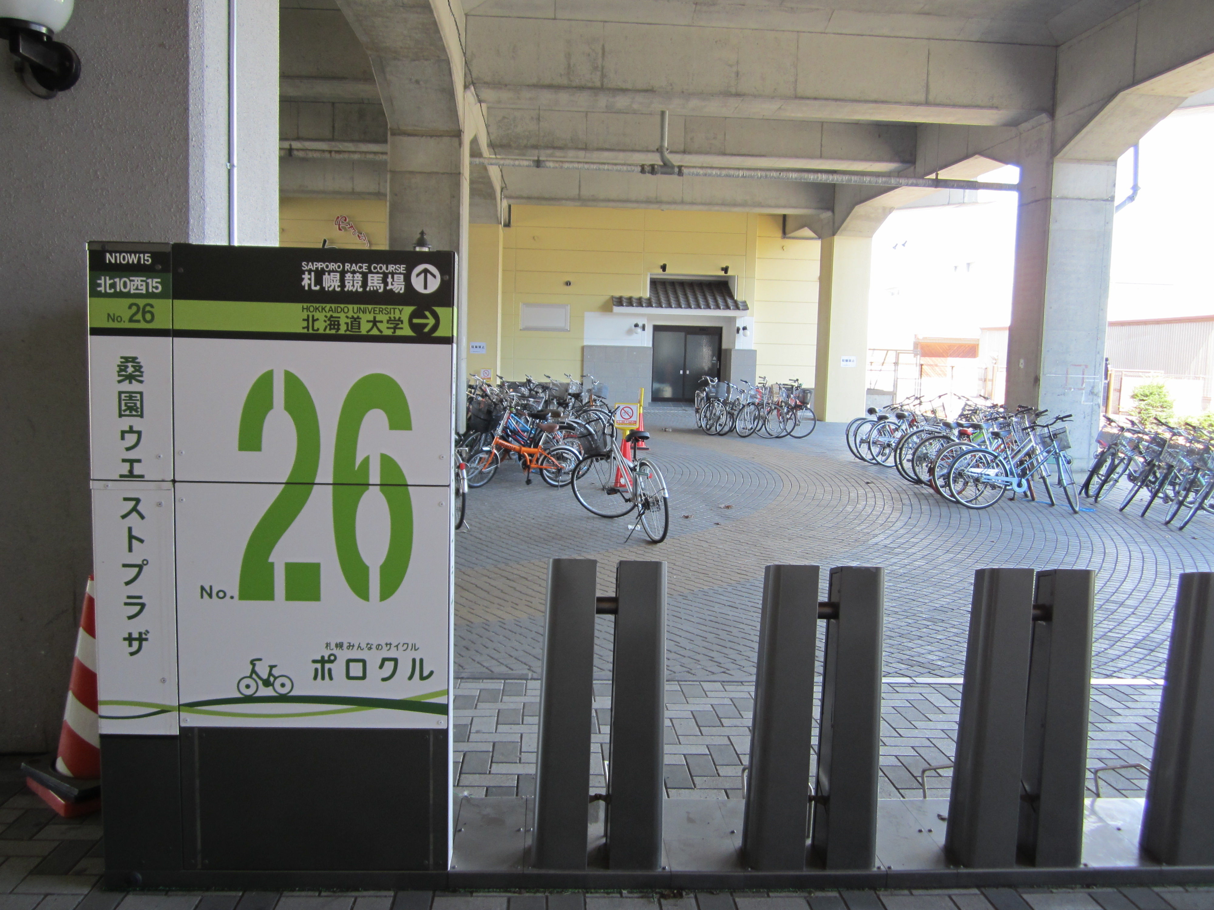 北海道札幌市のポロクル（桑園駅にて）